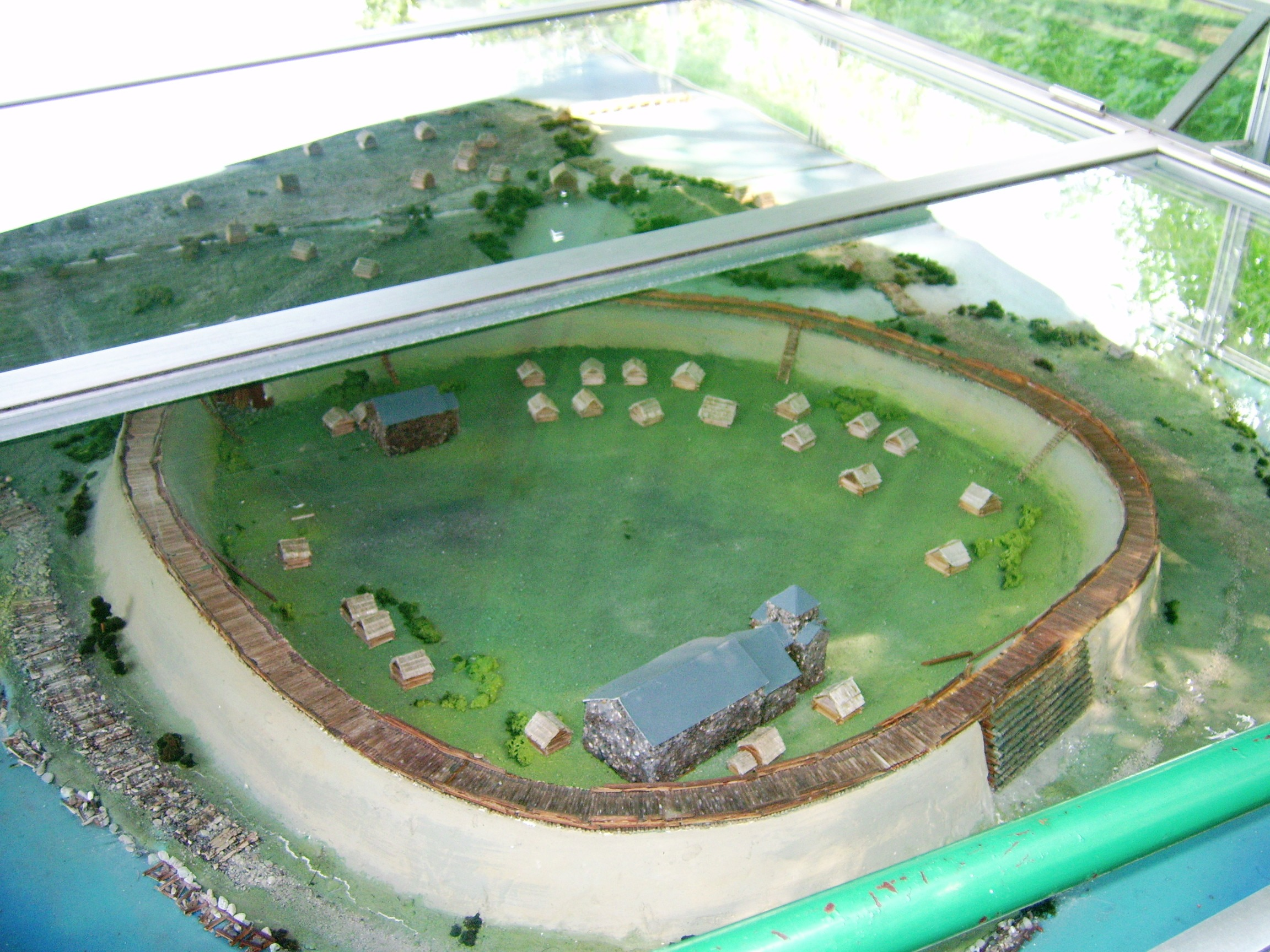 Ostrów Lednicki. Makieta grodu. (zabytek nr rejestr. A/2404)